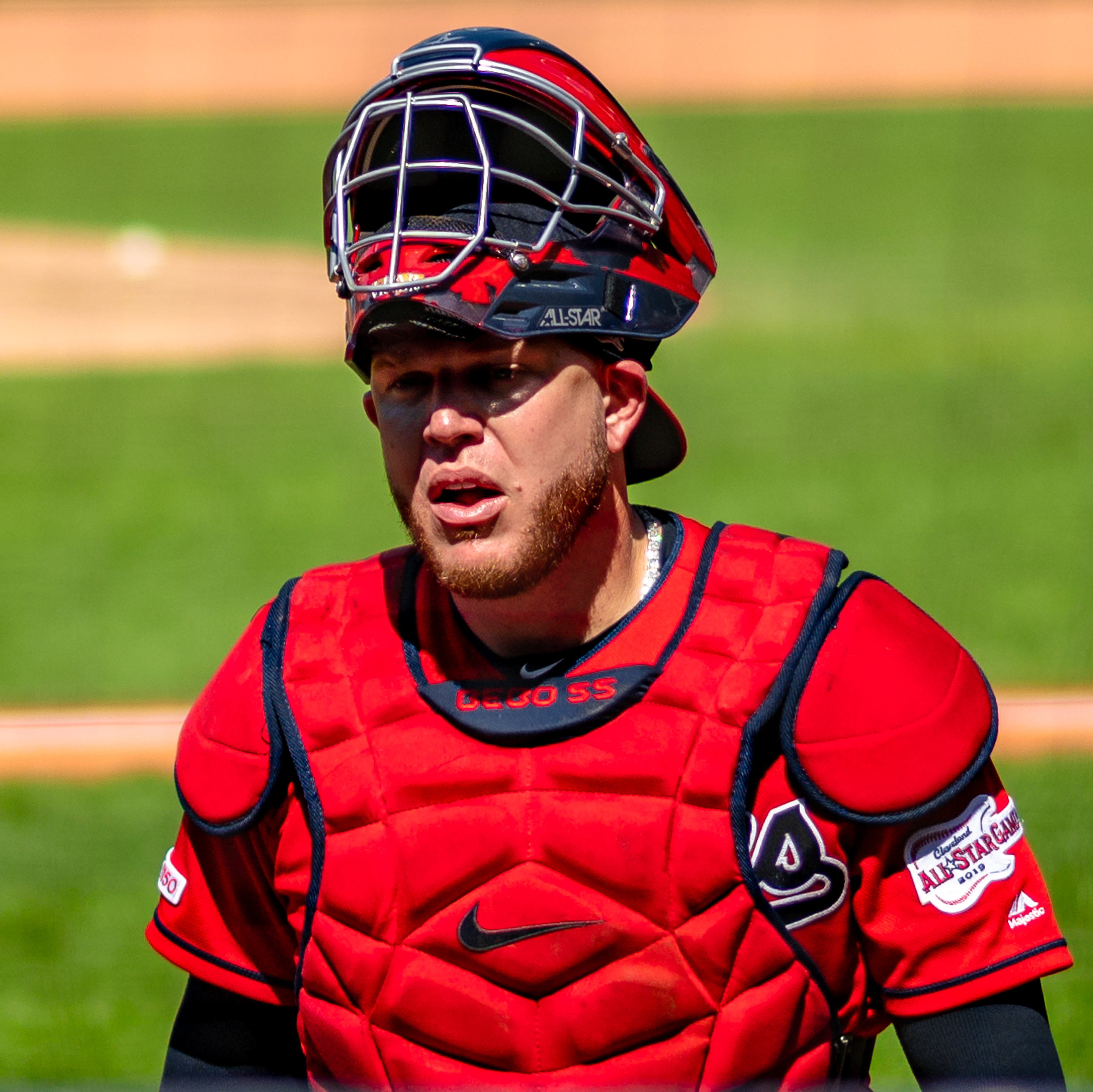 Taken on August 4, 2019